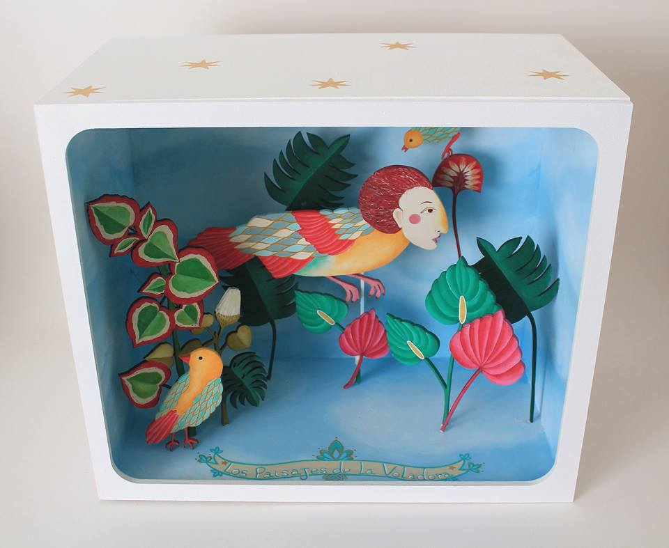 Año 2018; técnica: dioramas pictórico; medidas 45x35x19 cm.